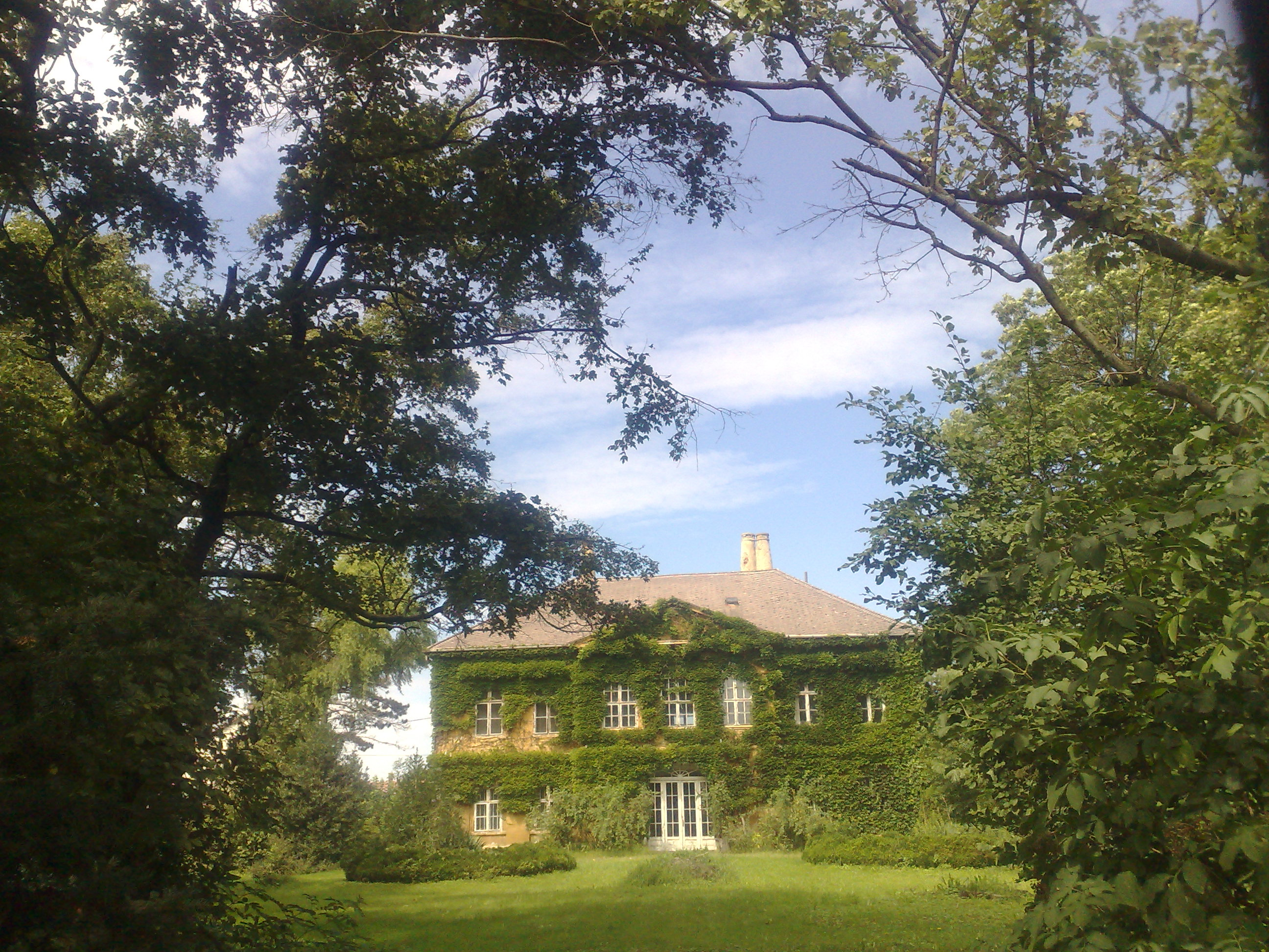 Szilsárkány - Lakóház, volt Baditz-kastély, klasszicista, 19. sz. első fele.